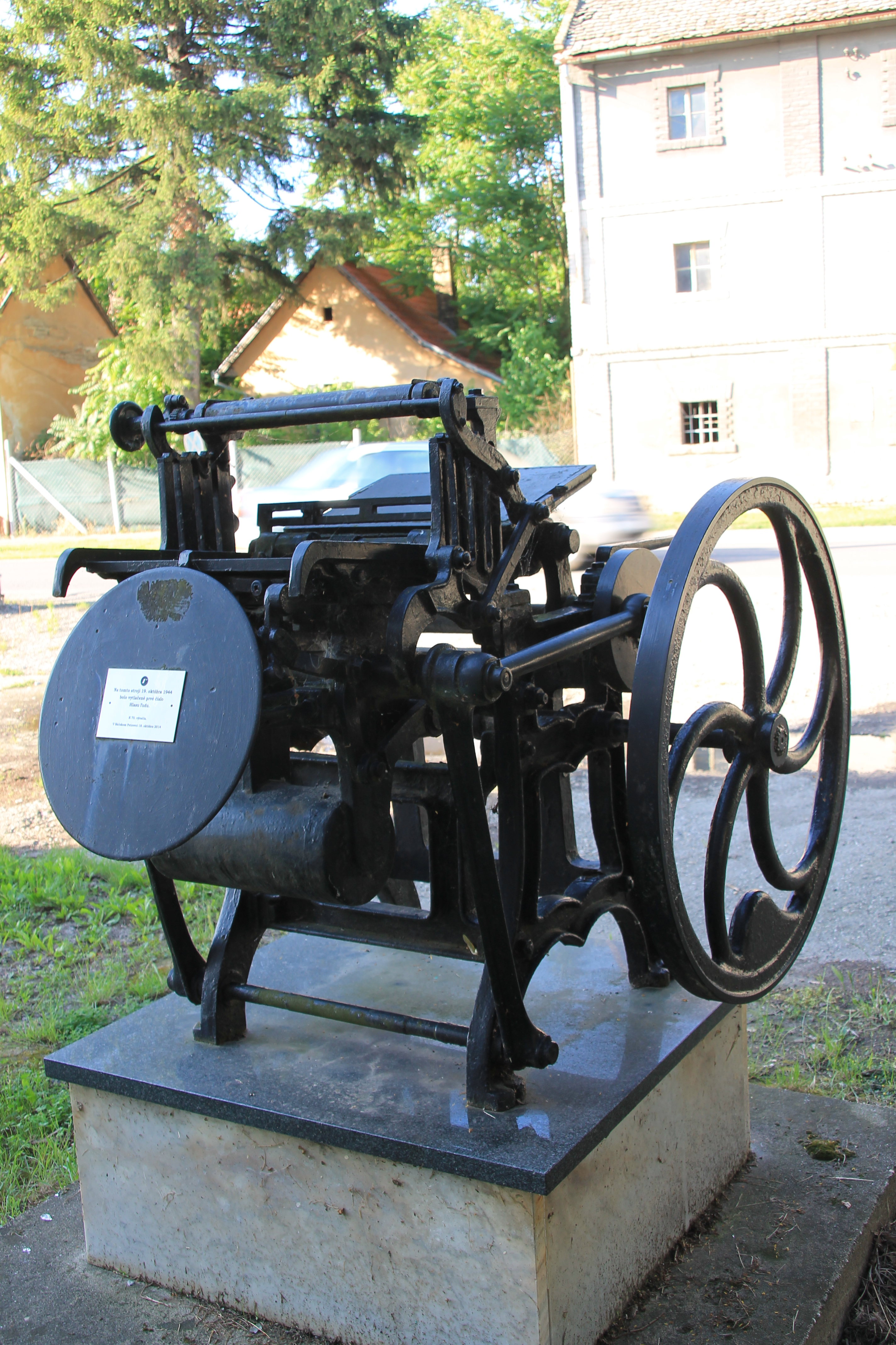 Bački Petrovac